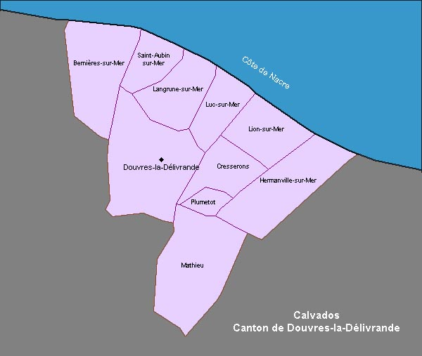 Carte du canton administratif français de Douvres-la-Délivrande, qui fait partir de l'arrondissement de Caen et de la 5e circonscription du Calvados, en région Basse-Normandie.